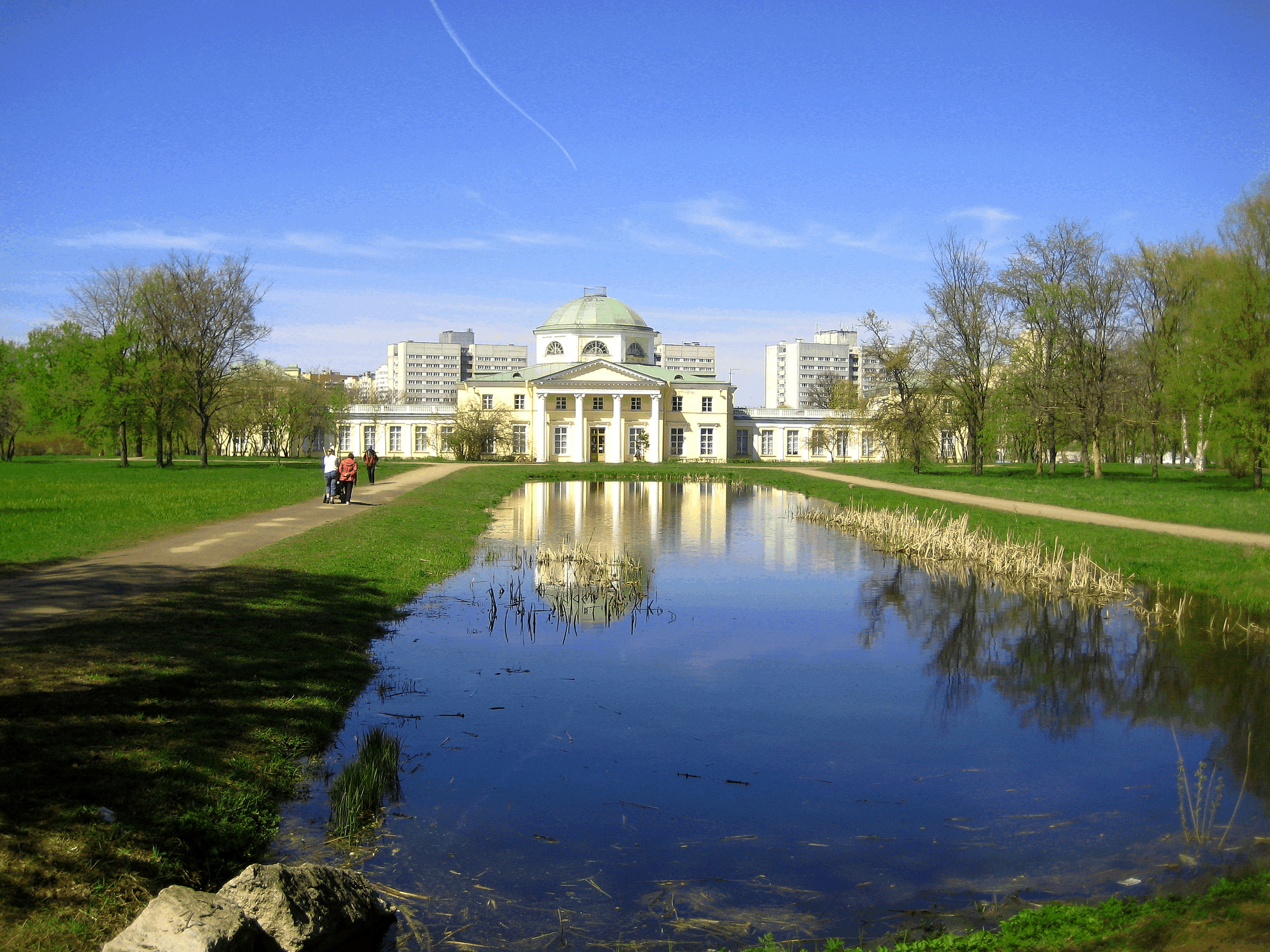 Дача: проспект Стачек, 226, Кировский район, Санкт-Петербург